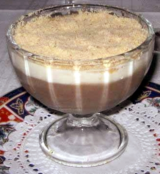 Assidat Zgougou, Dessert Tunisien